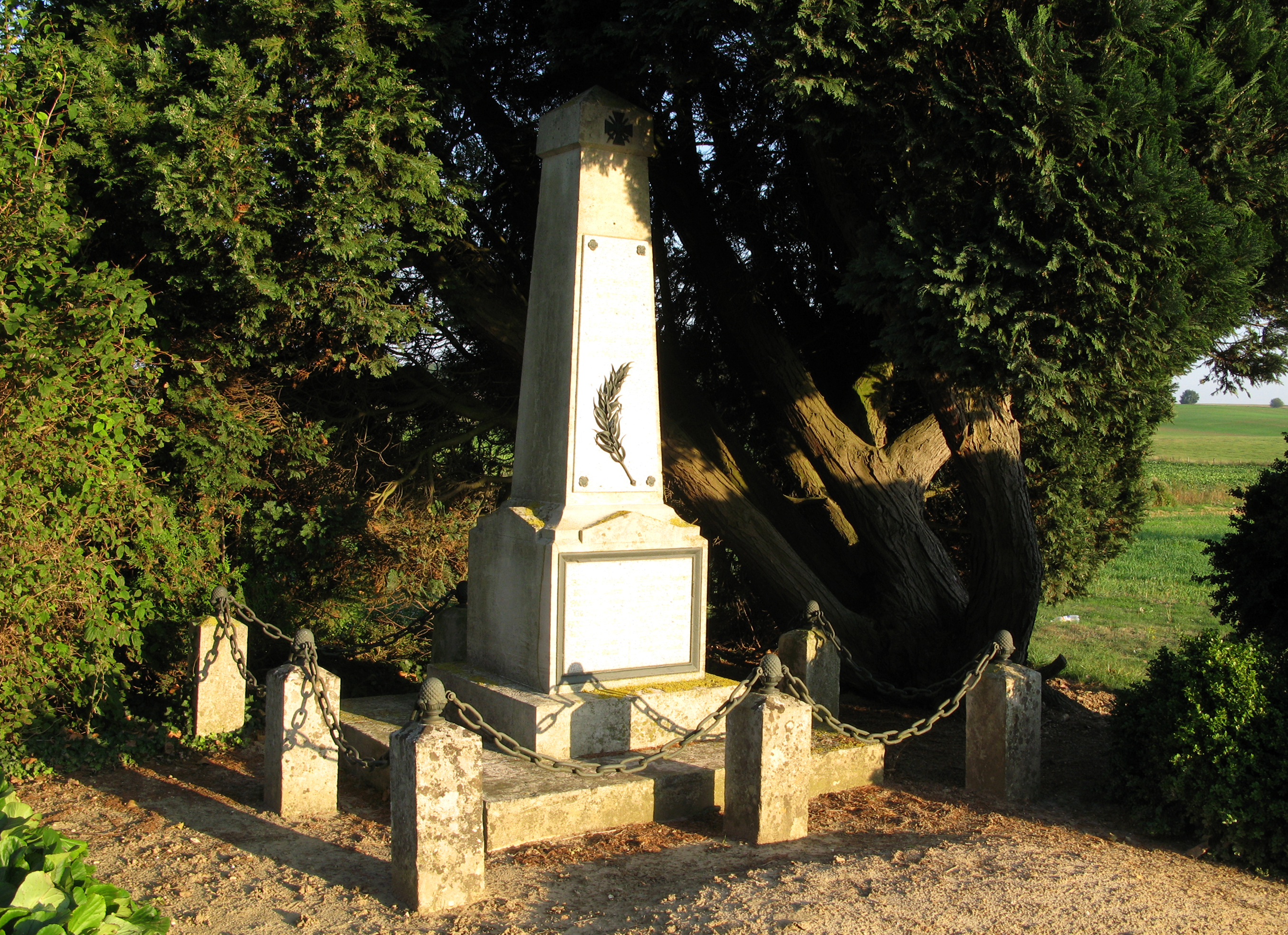 Saint-Rémy-Blanzy (Aisne, France) - Le monument-aux-Morts. . .